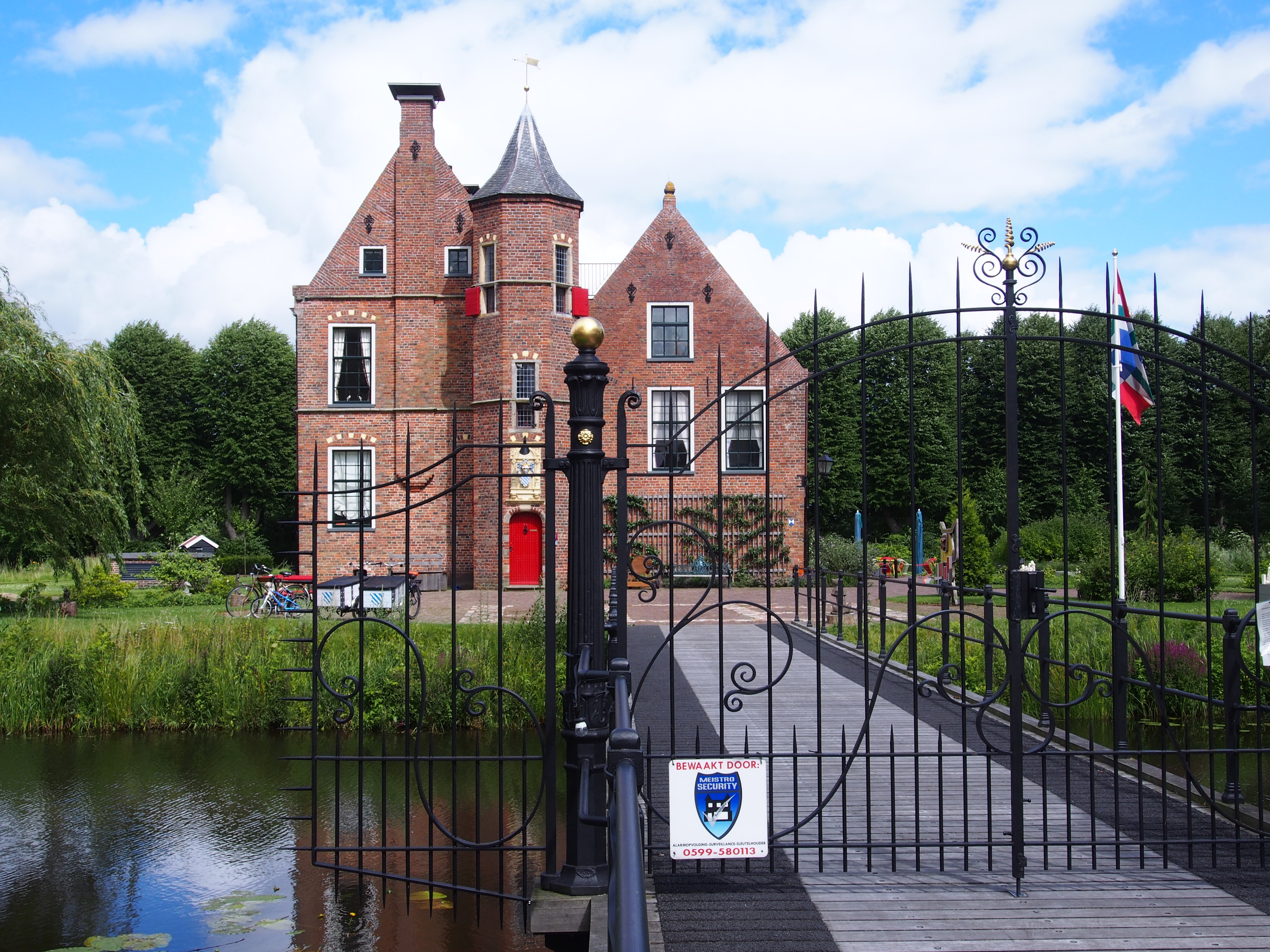 Brug naar de Wedderborg Wedde